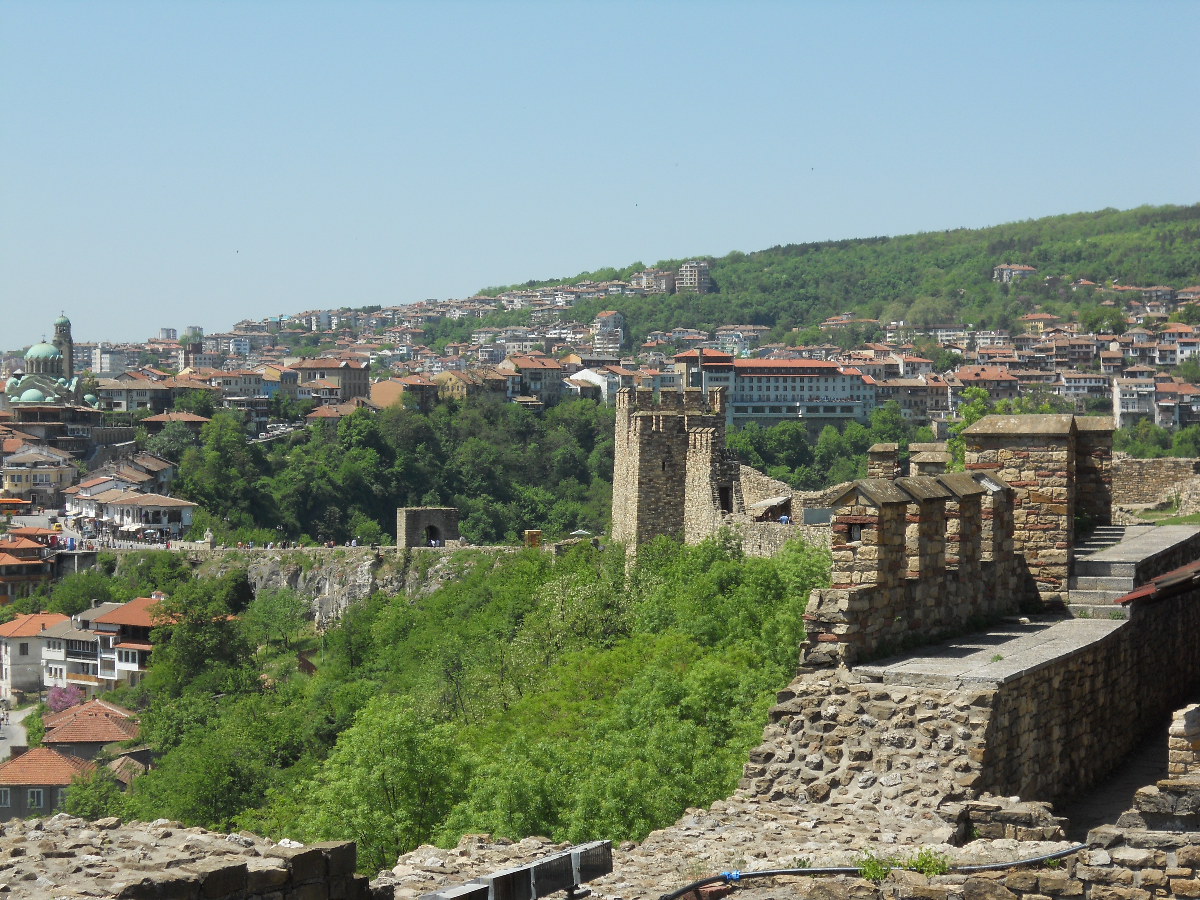 Патриаршески комплекс Царевец